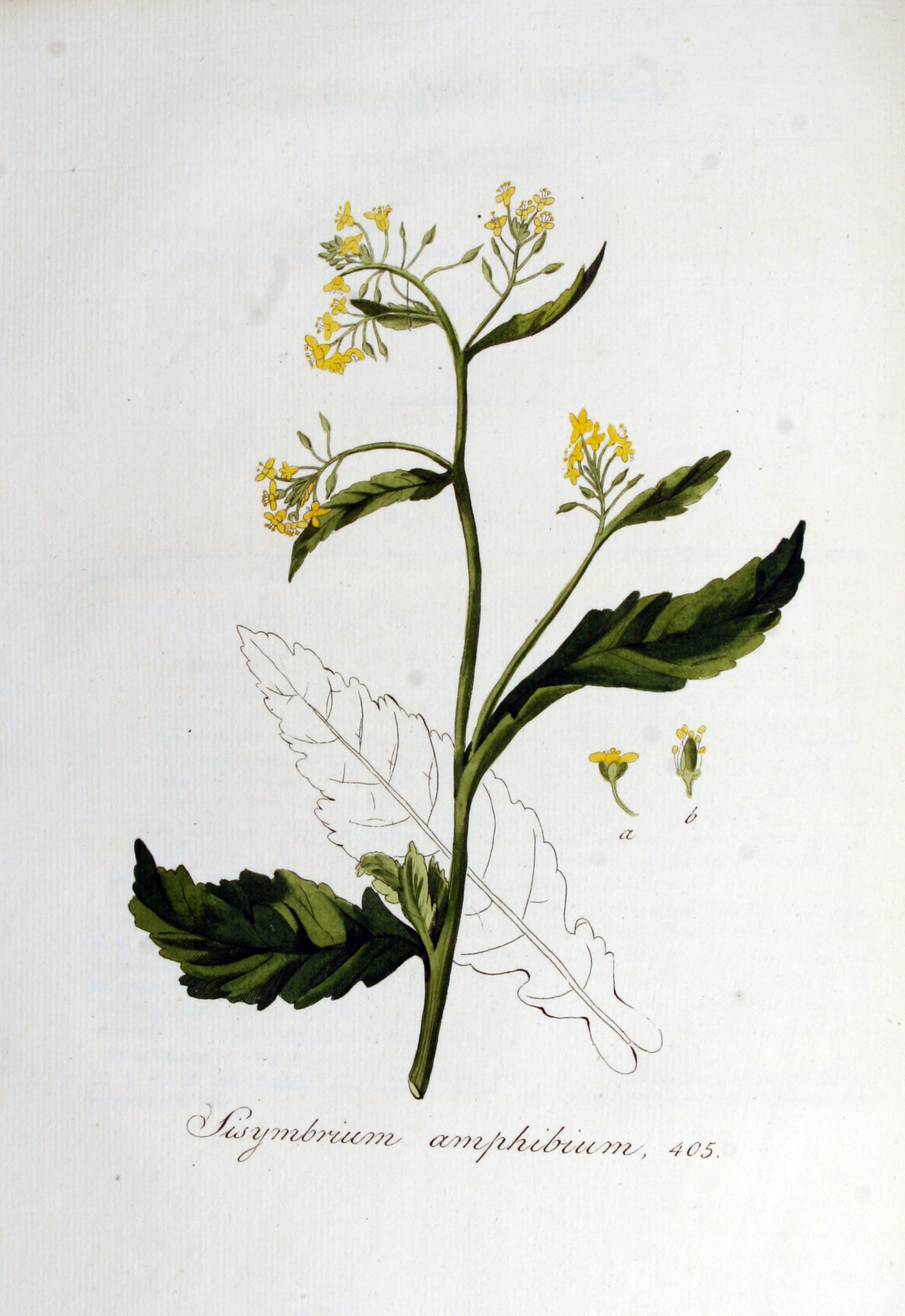 Rorippa amphibia (L.) Besser (Syn. Sisymbrium amphibium L.)